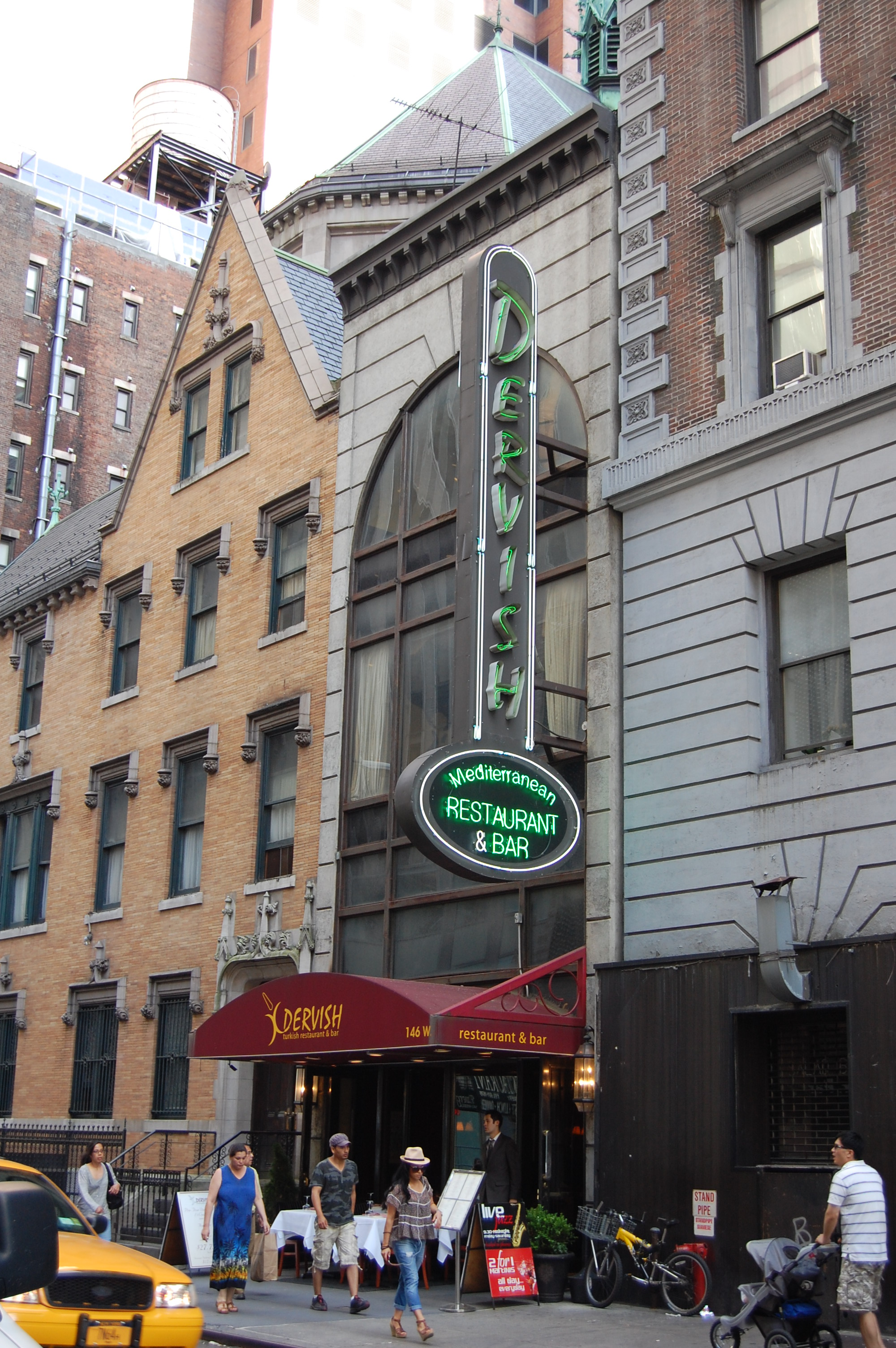 Dervish Restaurant 146 West 47th Street, New York, NY. Der Inhaber ist der prominenter ehemalige Türkische Fußballer Salim Görür. Das Foto wurde von mir persönlich mit meiner eigenen Kamera auf meiner NY-Reise im Sommer 2011 aufgenommen.